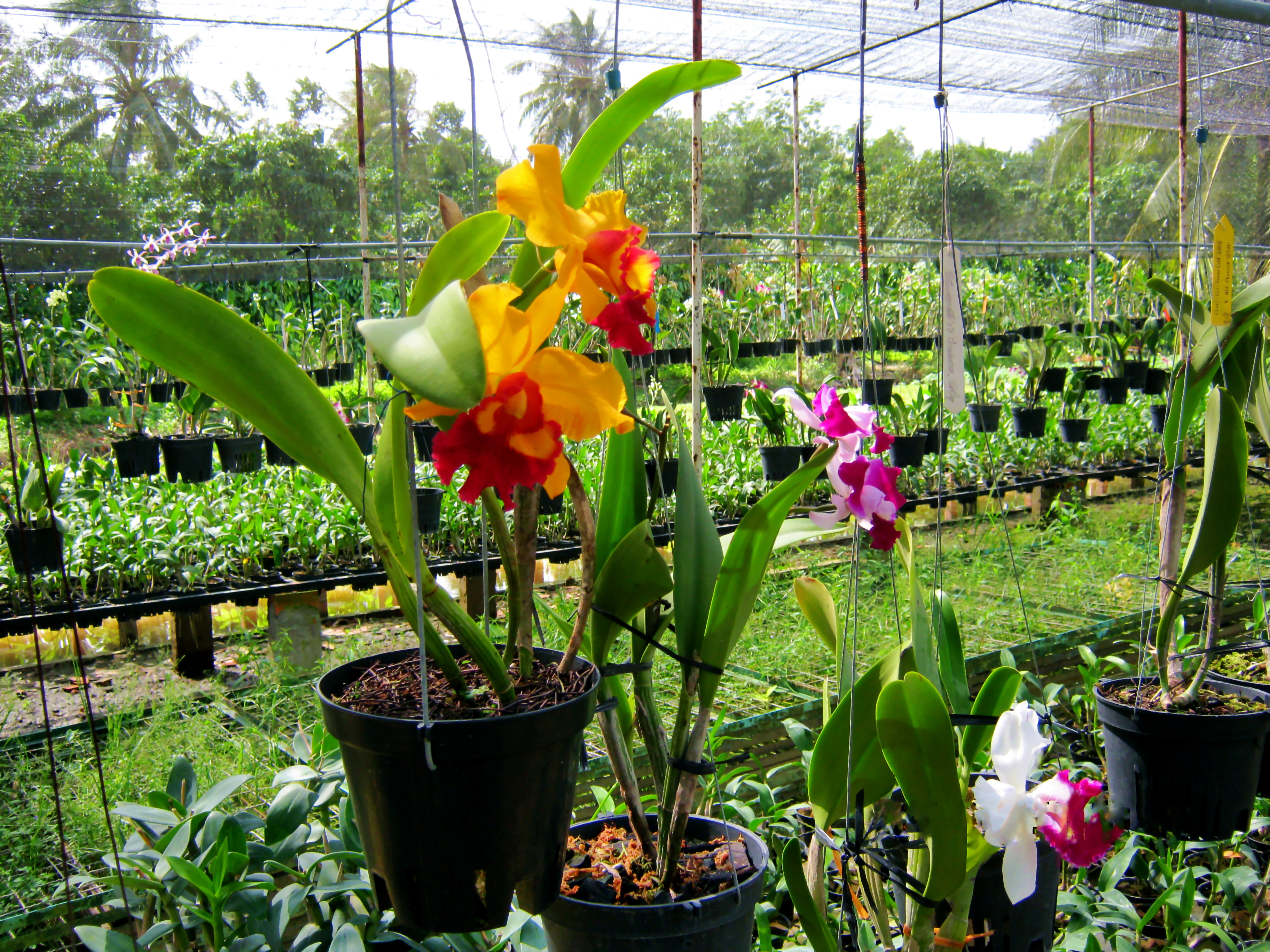 Một vườn hoa lan ở Tân Quy Đông (Sa Đéc, Đồng Tháp, Việt Nam).